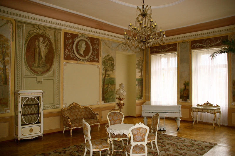 Salon muzyczny pałacu w Czerniejewie